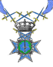 Ordre_de_l'épée de Suède tel que décrit par Louis Jaucourt dans l'encyclopédie et donc porté en 1750.